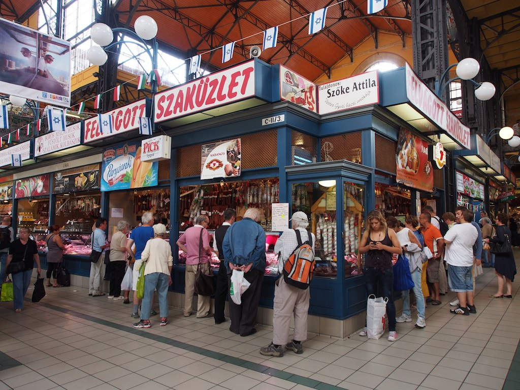 Great Market Hall Budapest